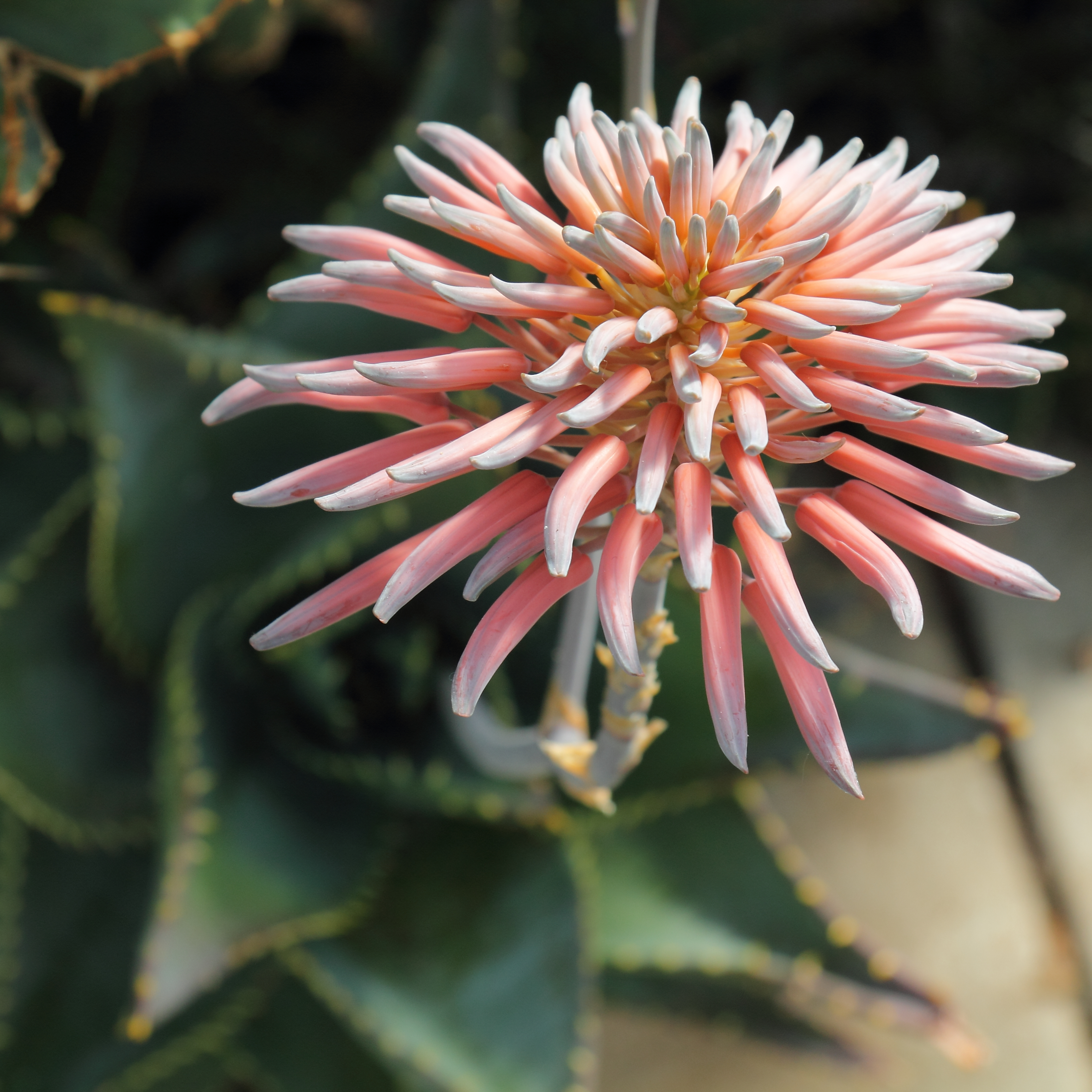 Aloe perfoliata, identifierad med hjälp av befintlig skylt vid Kew Gardens, London.